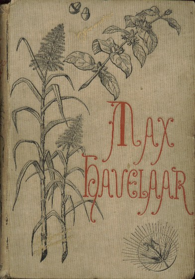 5e dr., linnen, 400 p. Laatste door de auteur herziene uitgave. In lichtgrijze band met rode belettering Variant A (Kets-Vree).